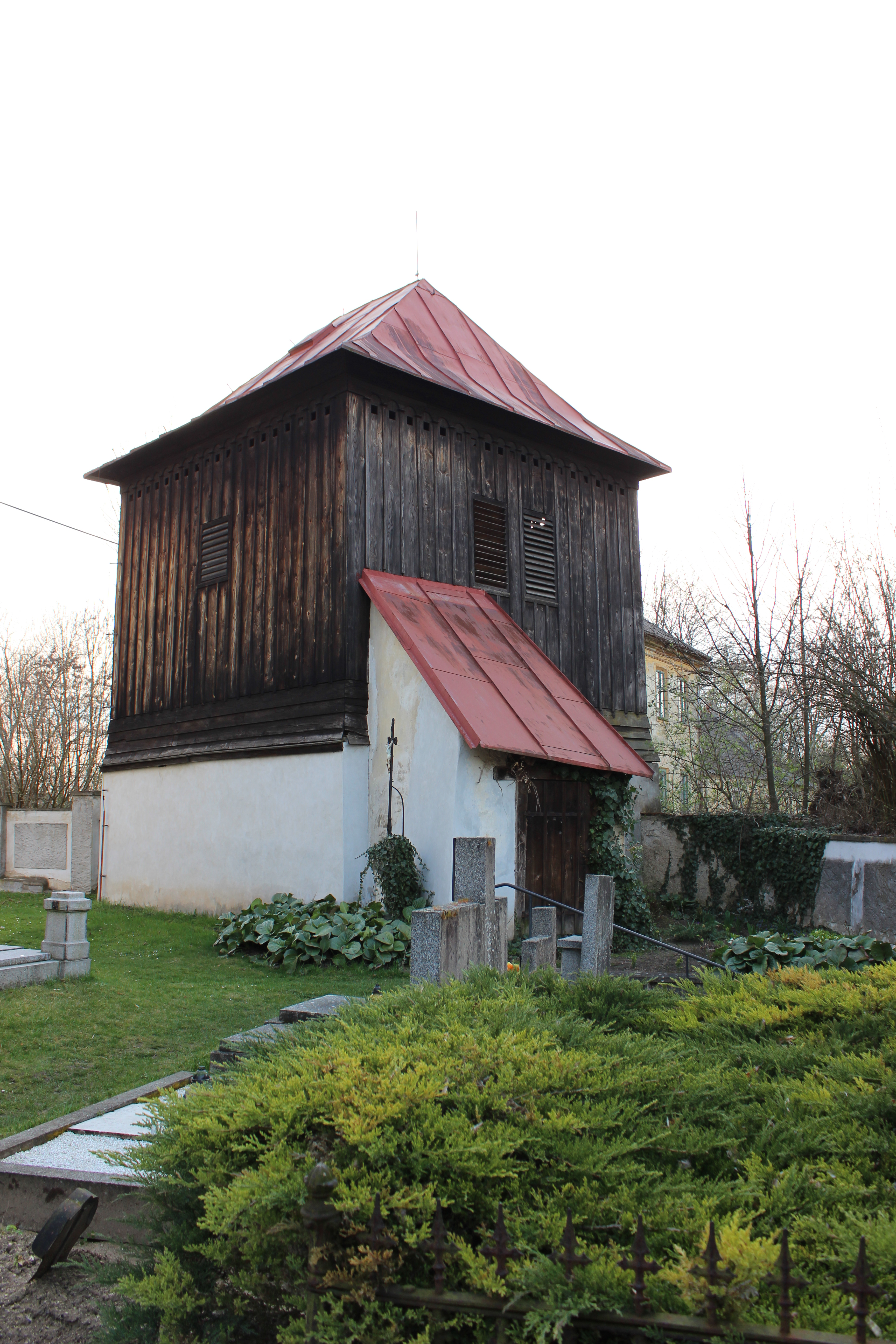 Zvonice u kostela svatého Jakuba Většího v Kadlíně. This photograph was taken with a Canon EOS 600D.